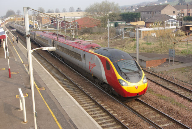 Lockerbie Station